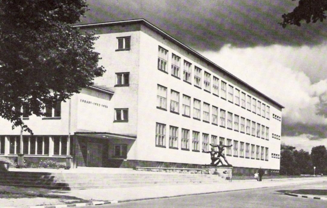 Handelshochschule in Königsberg (Ostpreußen), am Oberteich